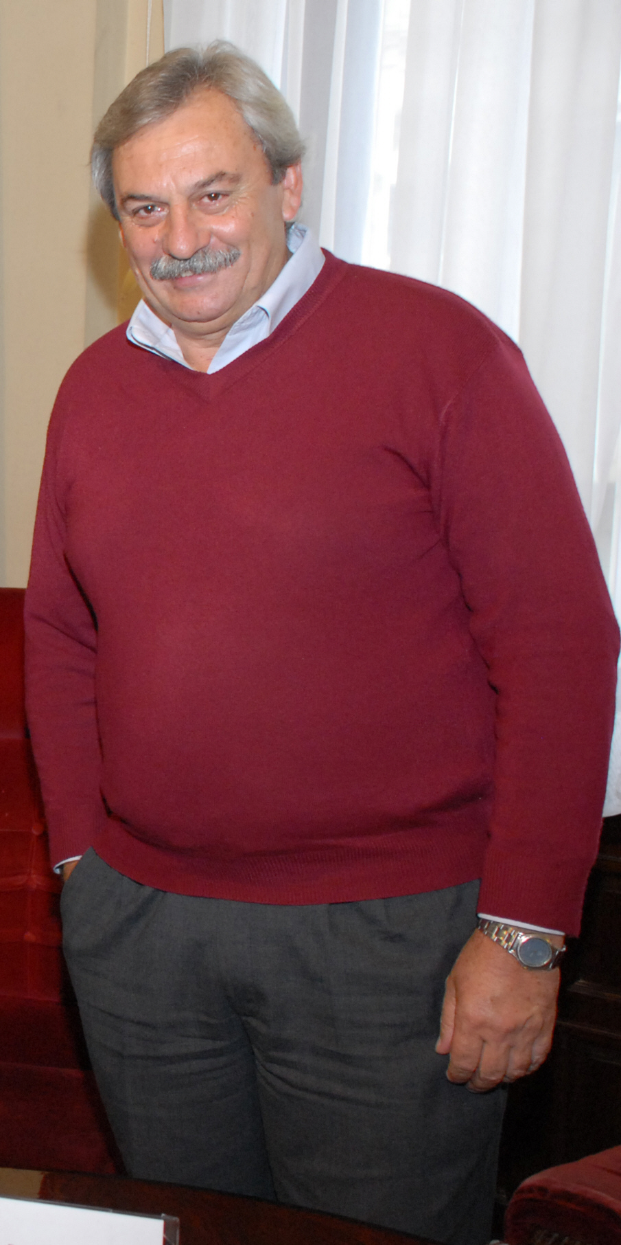 Político de Uruguay, Julio Pintos, Intendente del departamento de Paysandú por el período 2005 - 2010.